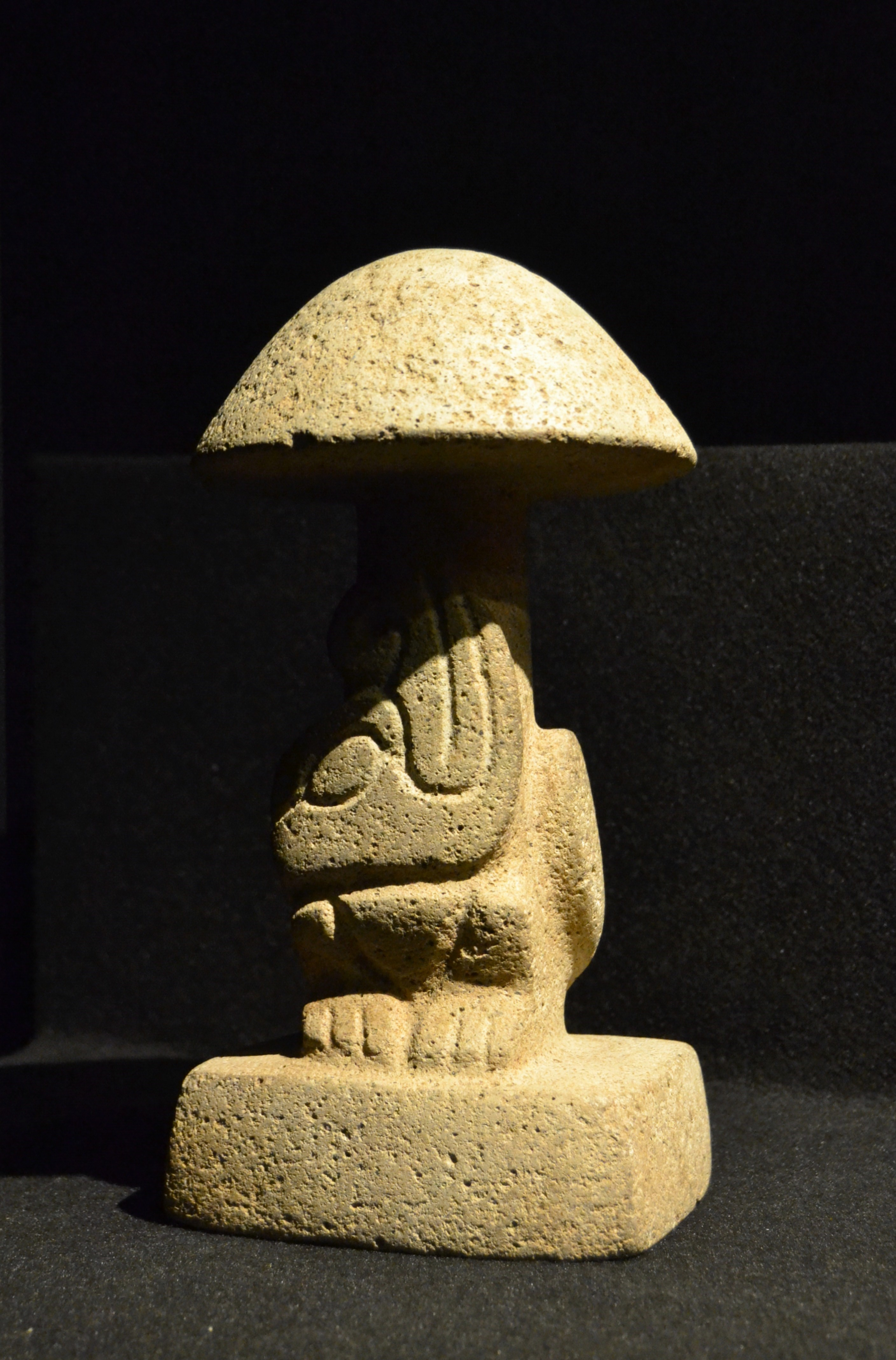 Escultura en forma de fong, Kaminaljuyú (Guatemala), període Preclàssic Tardà (300 aC - 250), basalt. museu d'Arqueologia i Etnologia, Guatemala (MUNAE). Exposició Maies. L'enigma de les Ciutats Perdudes del museu arqueològic d'Alacant. Les anomenades pedres-fong probablement s'utilitzaren durant les cerimònies d'intoxicació al·lucinògena. Els fons (Psylocybe mexicana) que contenien la substància psilocibina s'utilitzaven tant per a la intoxicació com per a anestesiar el dolor durant sacrificis de sang. Sovint, aquestos objectes es decoraven amb motius d'animals, com es mostra en aquesta peça on s'hi observen trets d'una au.